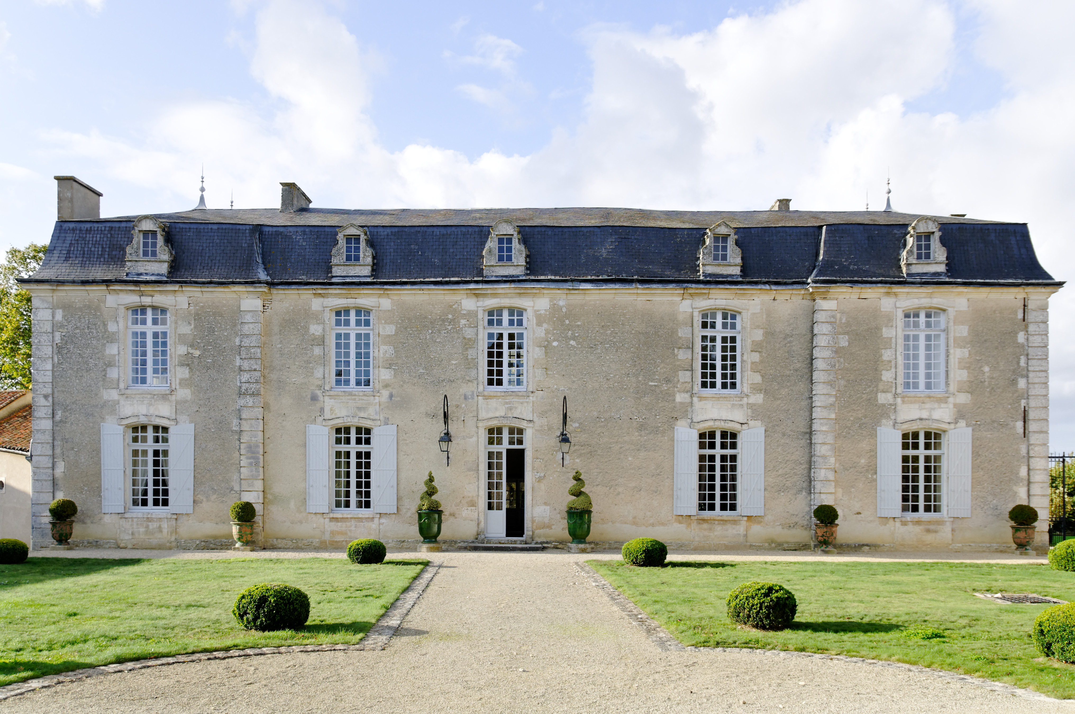 Château d'Yversay dans la Vienne (86) .